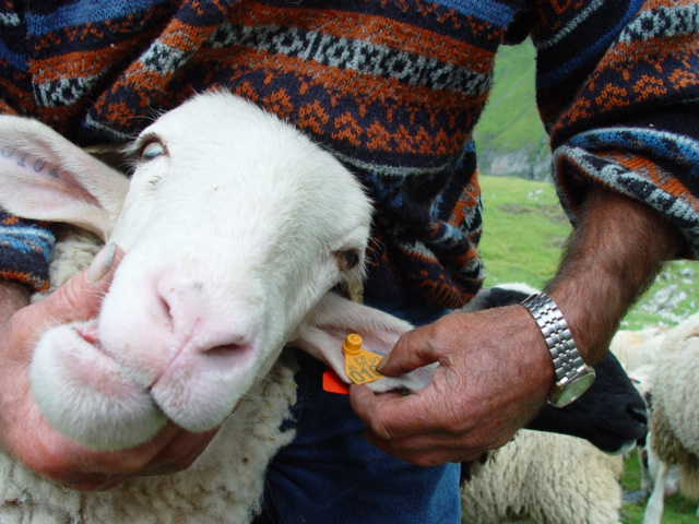 Identification d'un sujet de la race barégeoise, estive près de Gavarnie